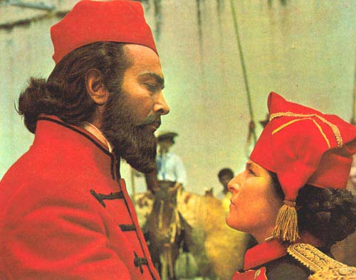 Fotografía color sobre papel brillante. Escena de la película "Güemes, la tierra en armas" donde se muestra el encuentro entre el General Güemes, personificado por Alfredo Alcón de perfil derecho, y Juana Azurduy, personificada por Mercedes Sosa, de perfil izquierdo. Ambos visten uniformes militares. Al fondo se observan dos personajes masculinos, uno de ellos montado en un caballo.